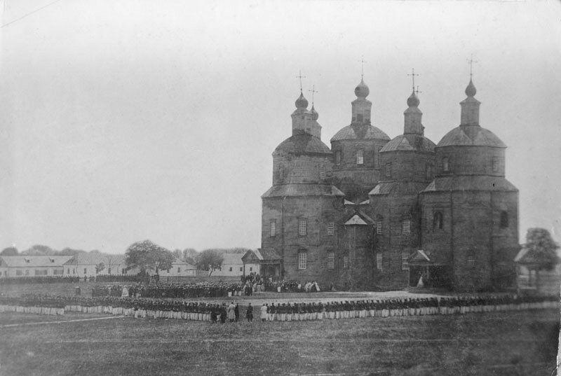 Екатеринодар. Торжественный молебен в честь окончания Кавказской войны в октябре 1864 года на площади перед Воскресенским собором.